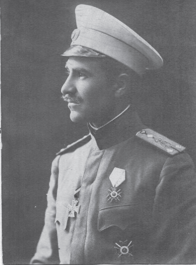 Капитан Атанас Стефанов, София, 1917 г.